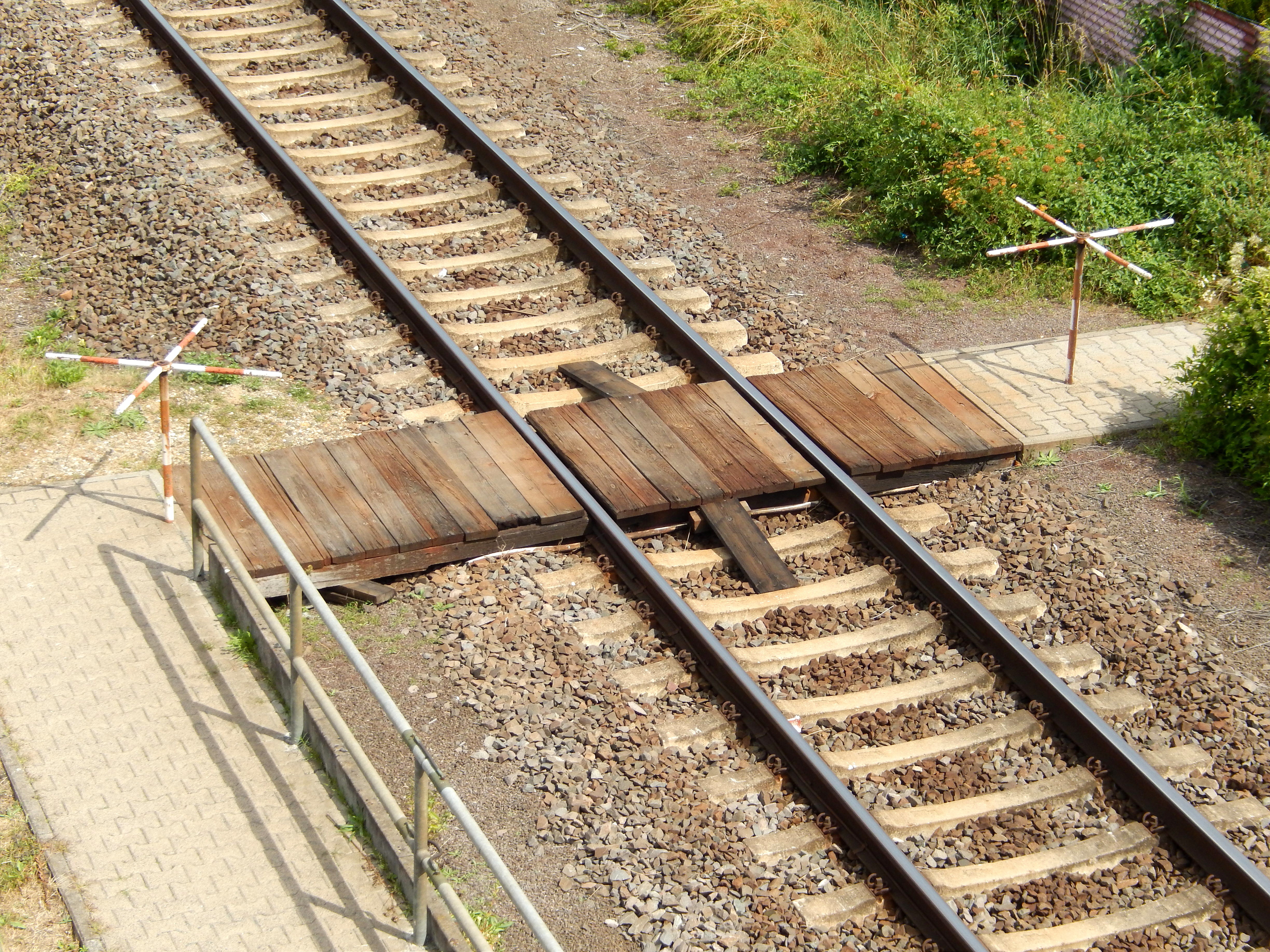 Ein nicht-technisch gesicherter Bahnübergang eines innerbetrieblichen Dienstwegs im Bahnhof Riedstadt-Goddelau. Beschäftigte werden durch zwei Drehkreuze an beiden Seiten vor den Gefahren aus dem Bahnbetrieb geschützt.